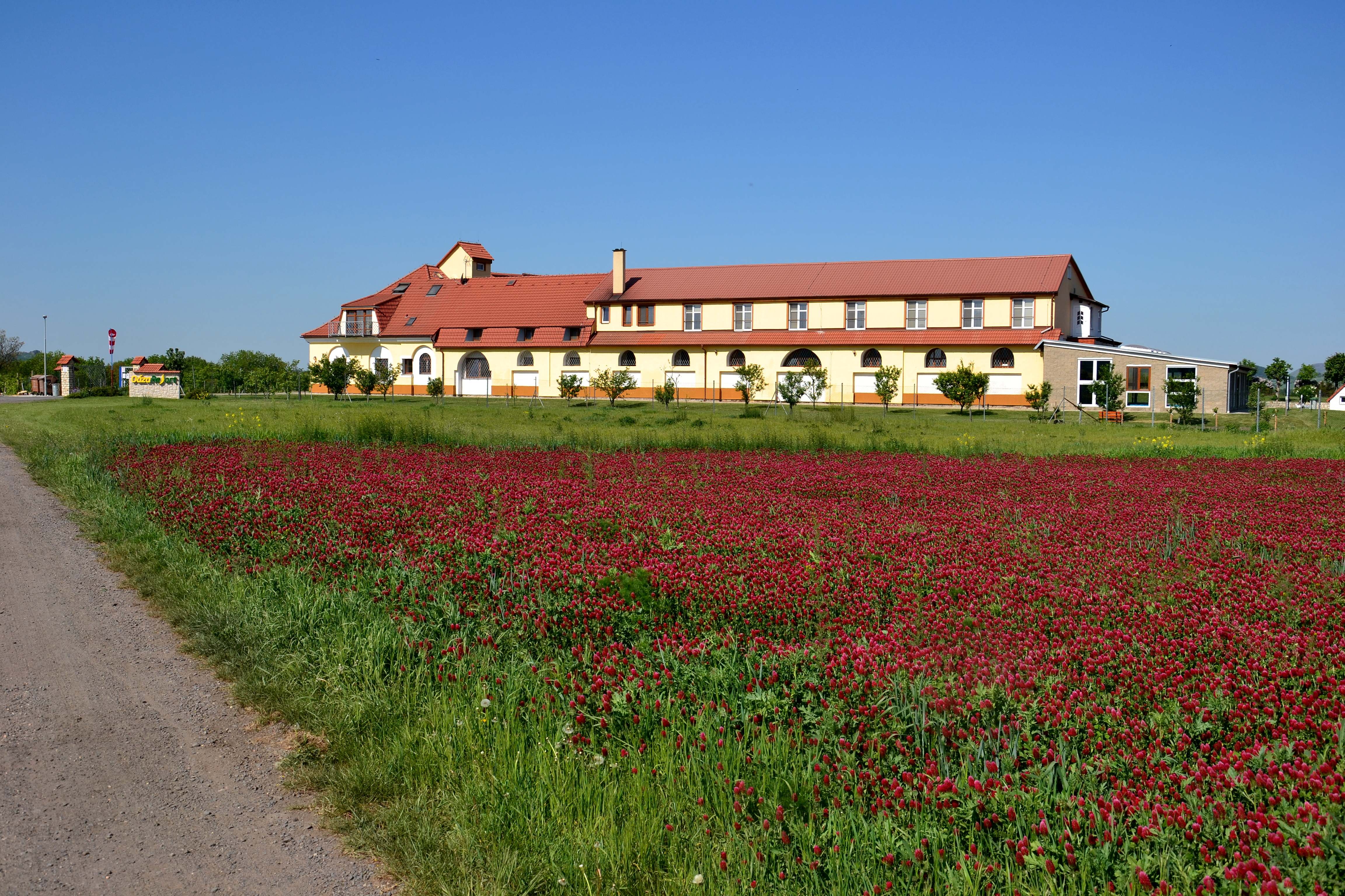 Kystra – Oáza Resort